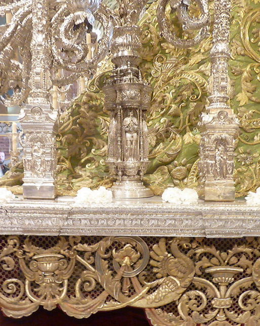 Palio £Virg Macarena